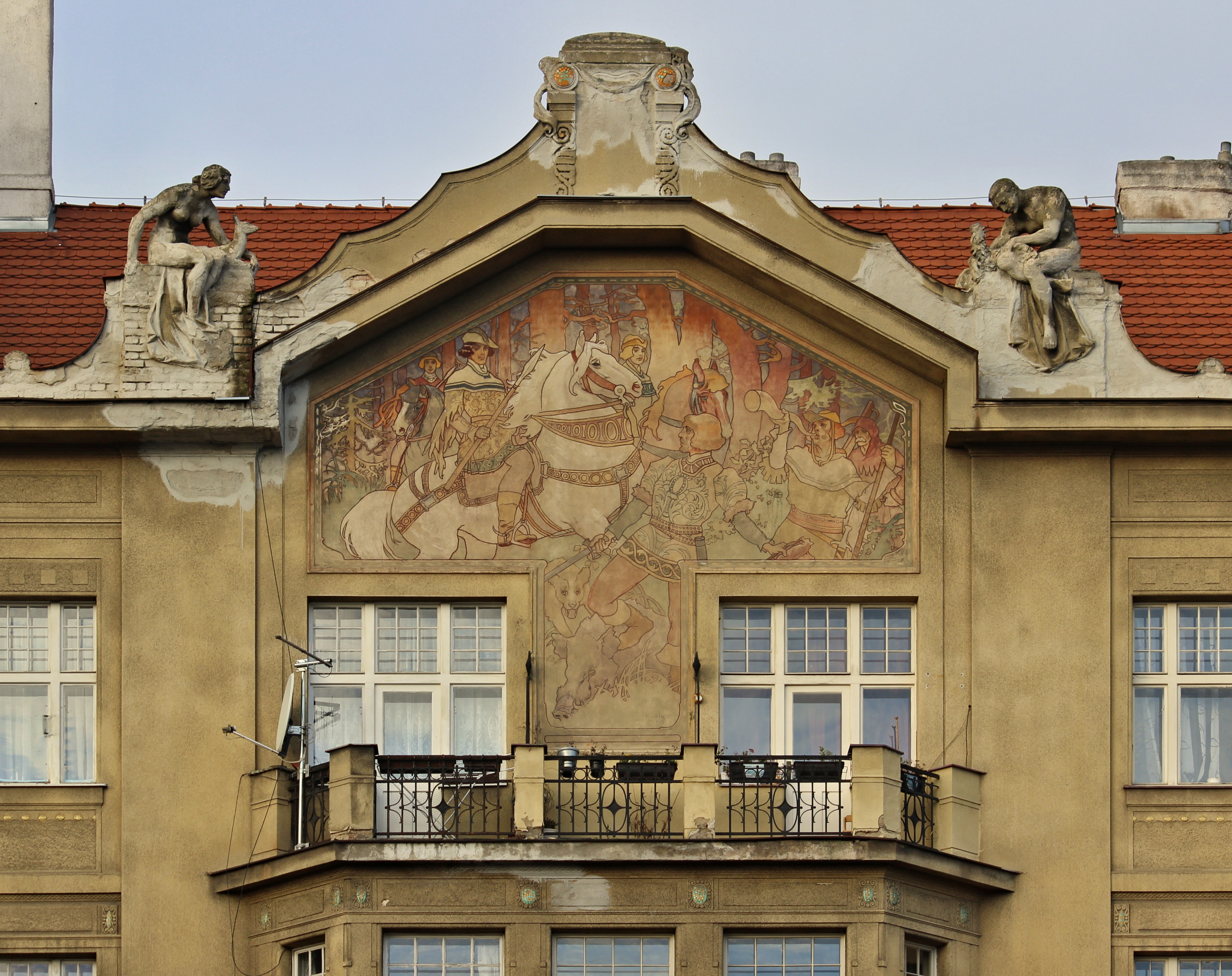 Dům Čs. armády 368/5, Praha 6-Bubeneč, Bubenečská 368/21, lovecký výjev (František Horník - Lánský)